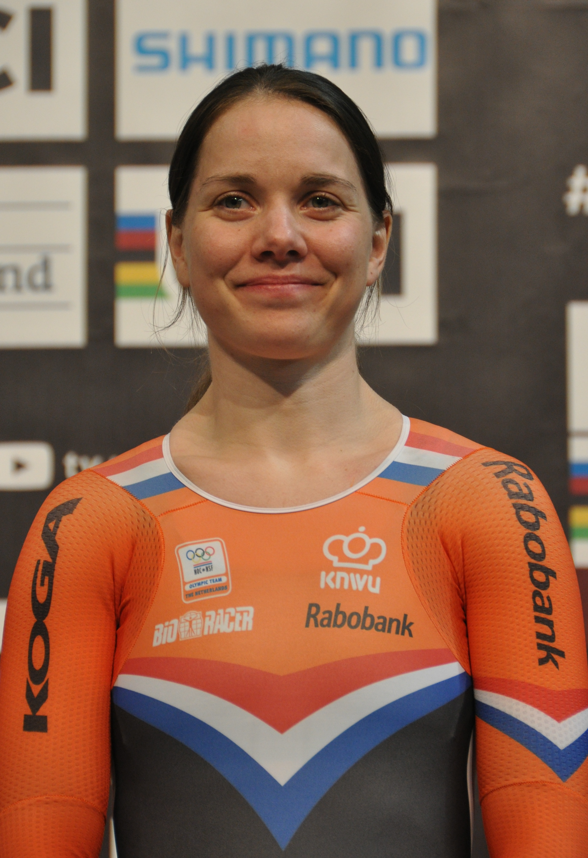 Laurine van Riessen, niederländische Radsportlerin